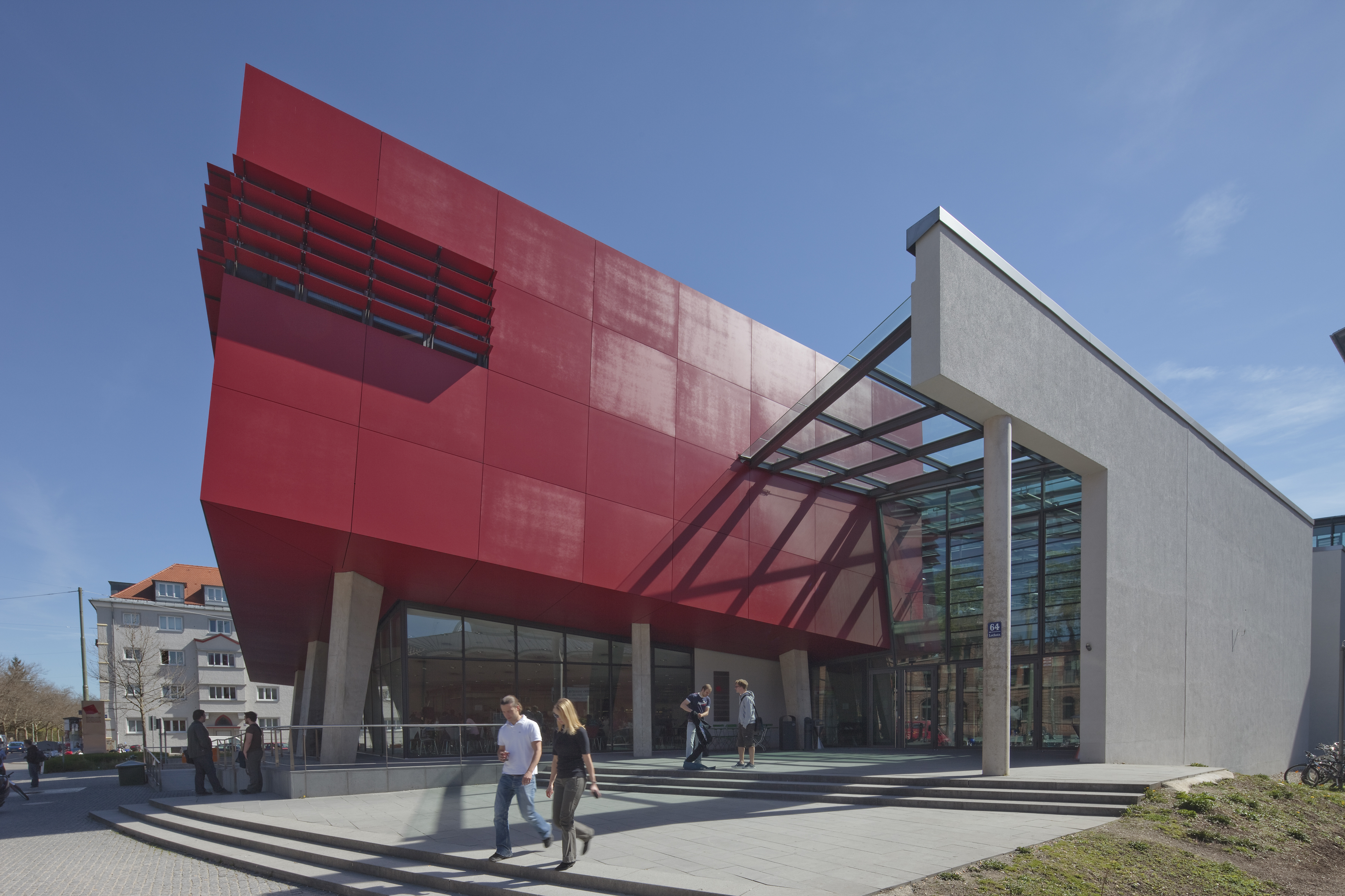 "Roter Würfel", Gebäude der Hochschule für angewandte Wissenschaften (Lothstraße 64, München)